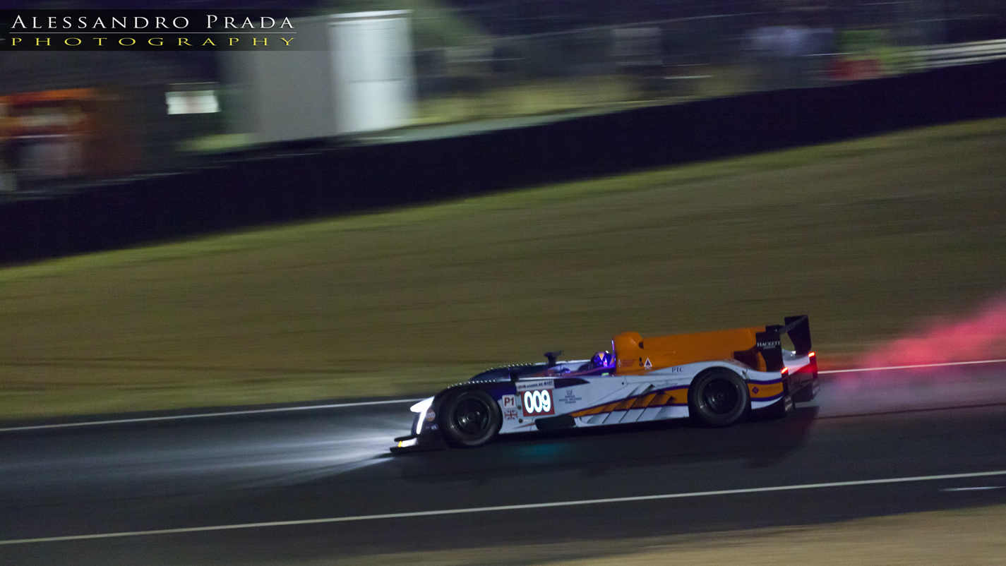 Aston Martin AMR-One en Q3 au Mans 2011